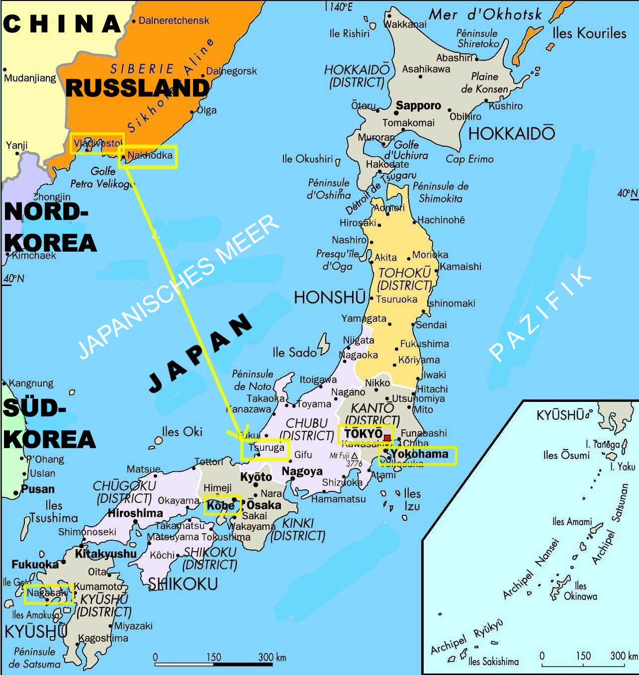 Jüdische Siedlungen in Japan